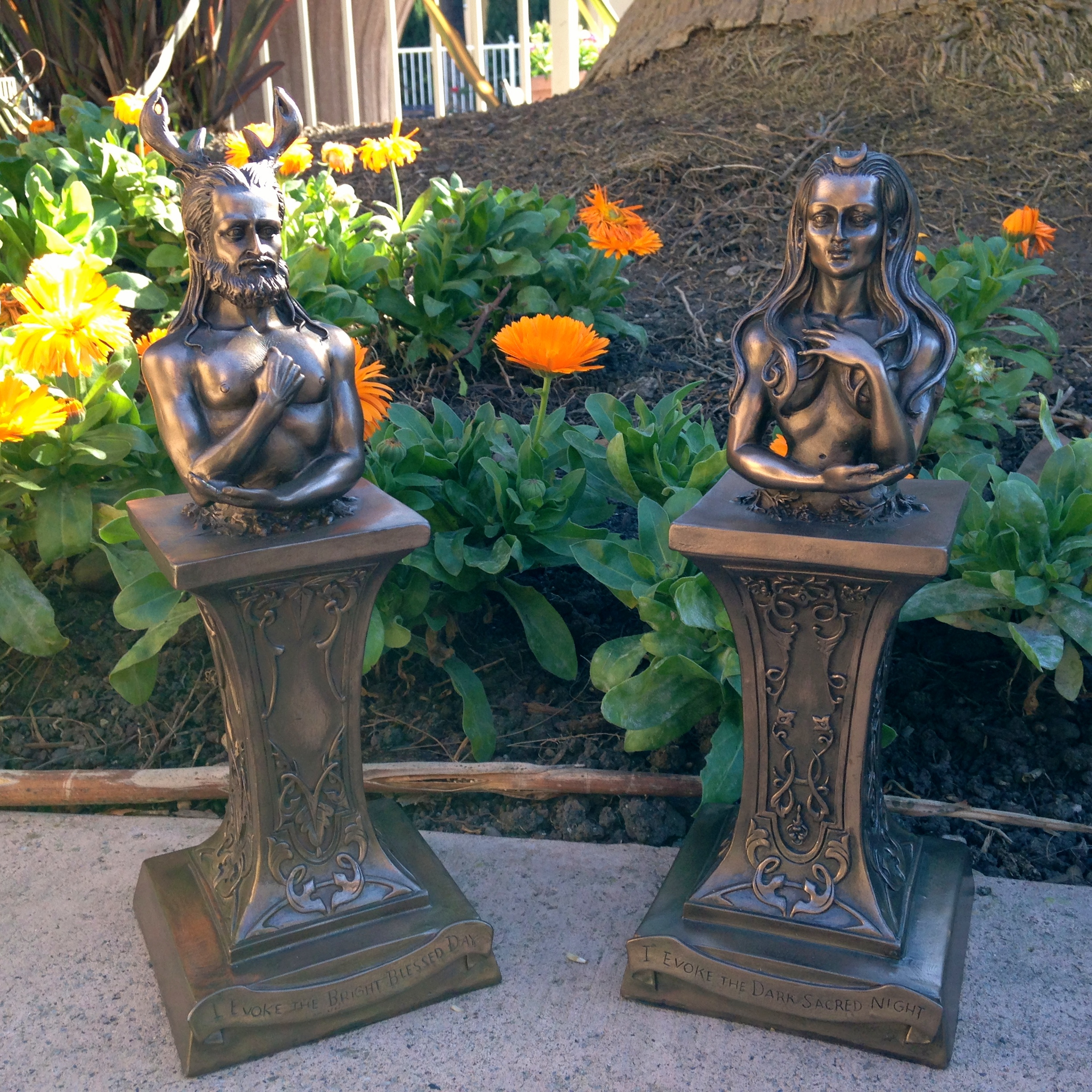 Αγάλματα του Θεού με τα Κέρατα και της Θεάς της Σελήνης